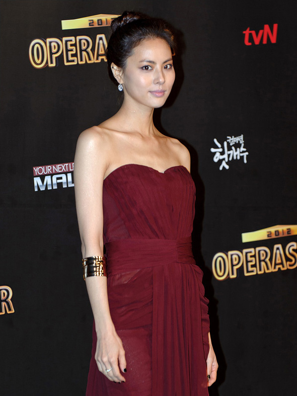 tvN 오페라스타 2012 제작 발표회에 참여한 박지윤